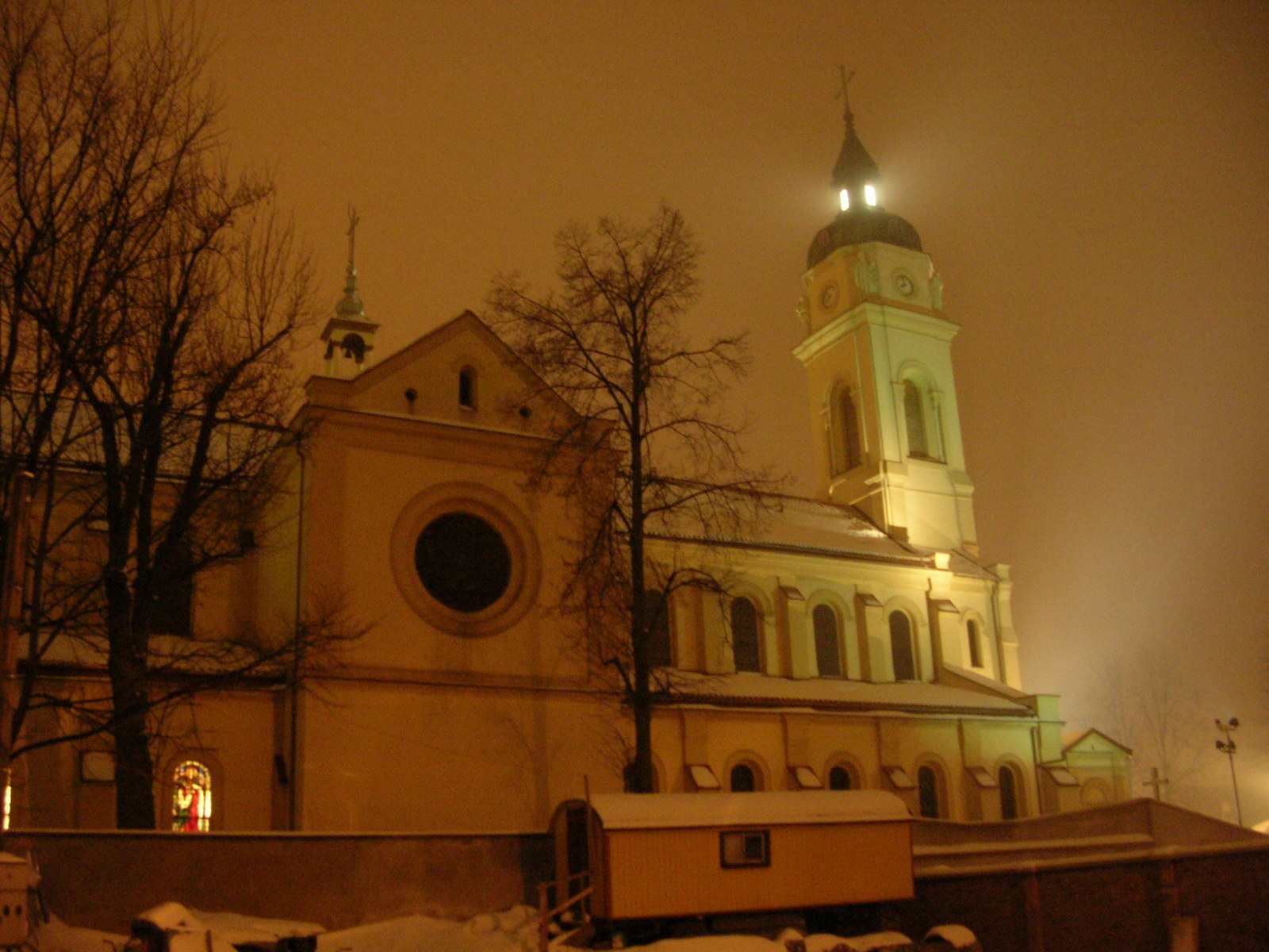 Zduńska Wola - kościół nocą Autor - Bartek Wawraszko